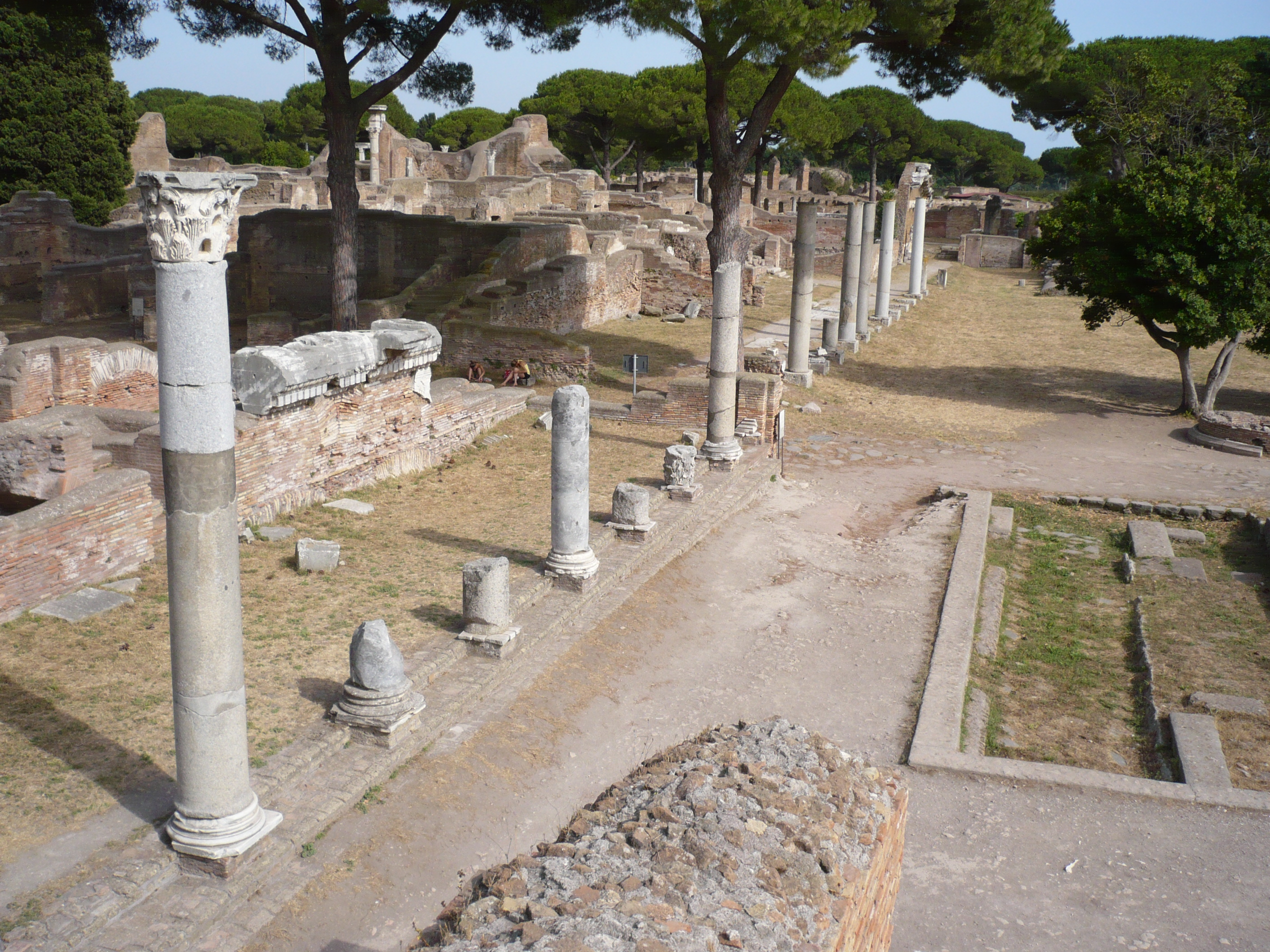 Forum of Ostia Antica / Il Foro di Ostia Antica.